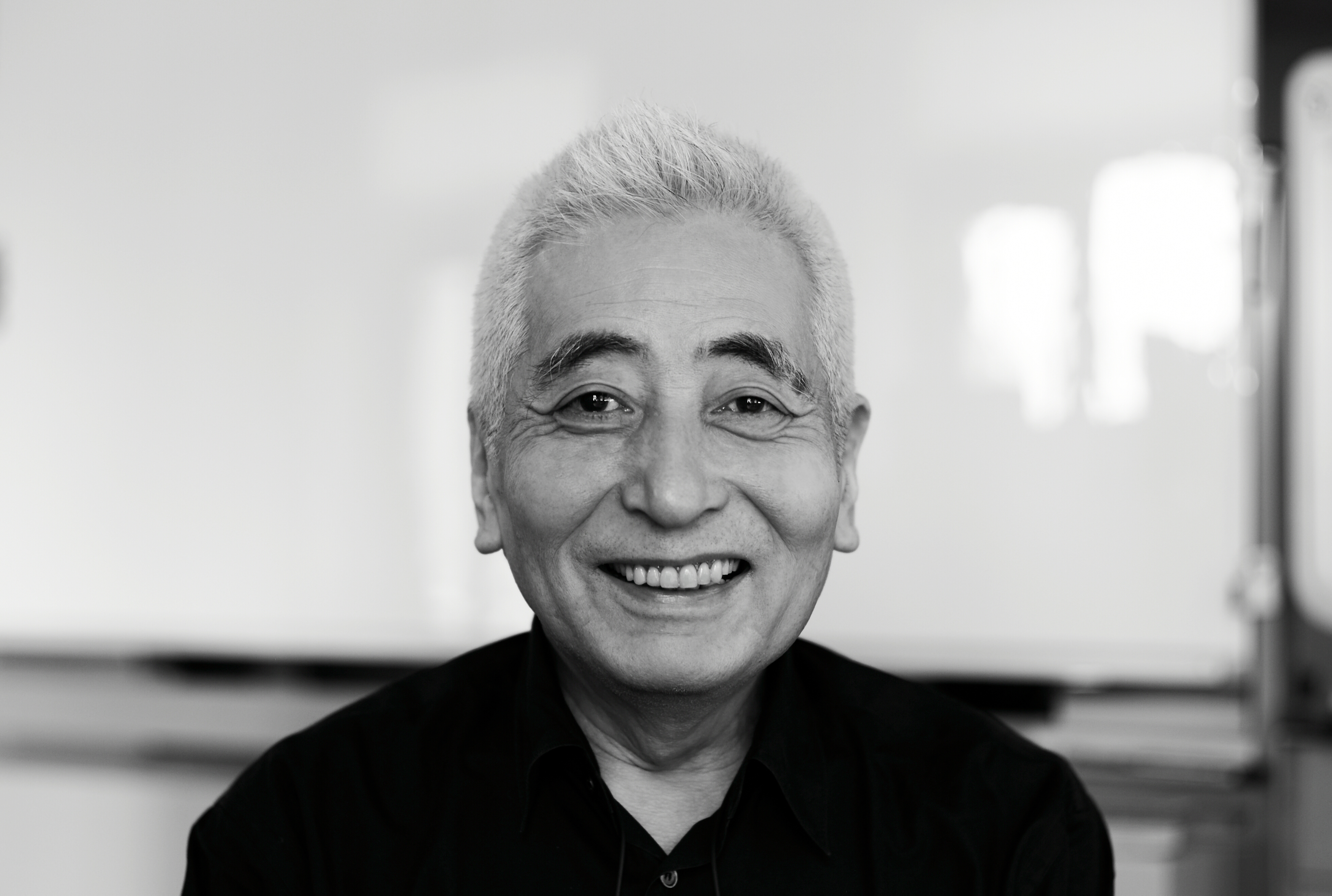 Shigeo MaruyamaShigeo Maruyama